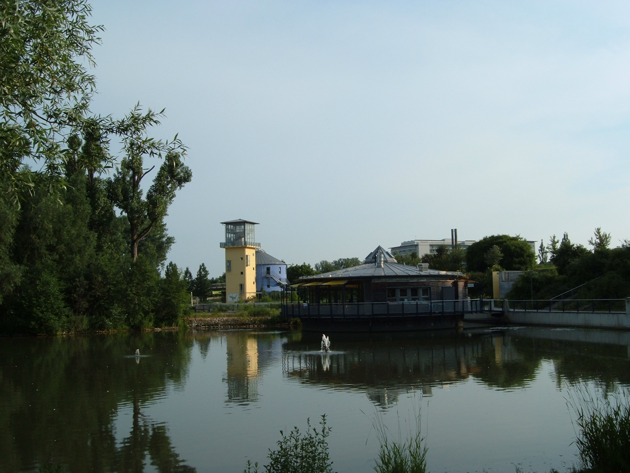 LGS-Park in Neumarkt